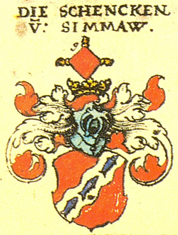 Ritterschaft und Adel in Franken Wappen der Familie der Schenken von Simmaw.